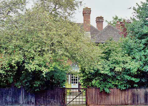 bis 1930 lebten die Tolkiens in der Northmoor Road 22 in Oxford. Dann zogen sie ein Haus weiter in die Northmoor Road 20.